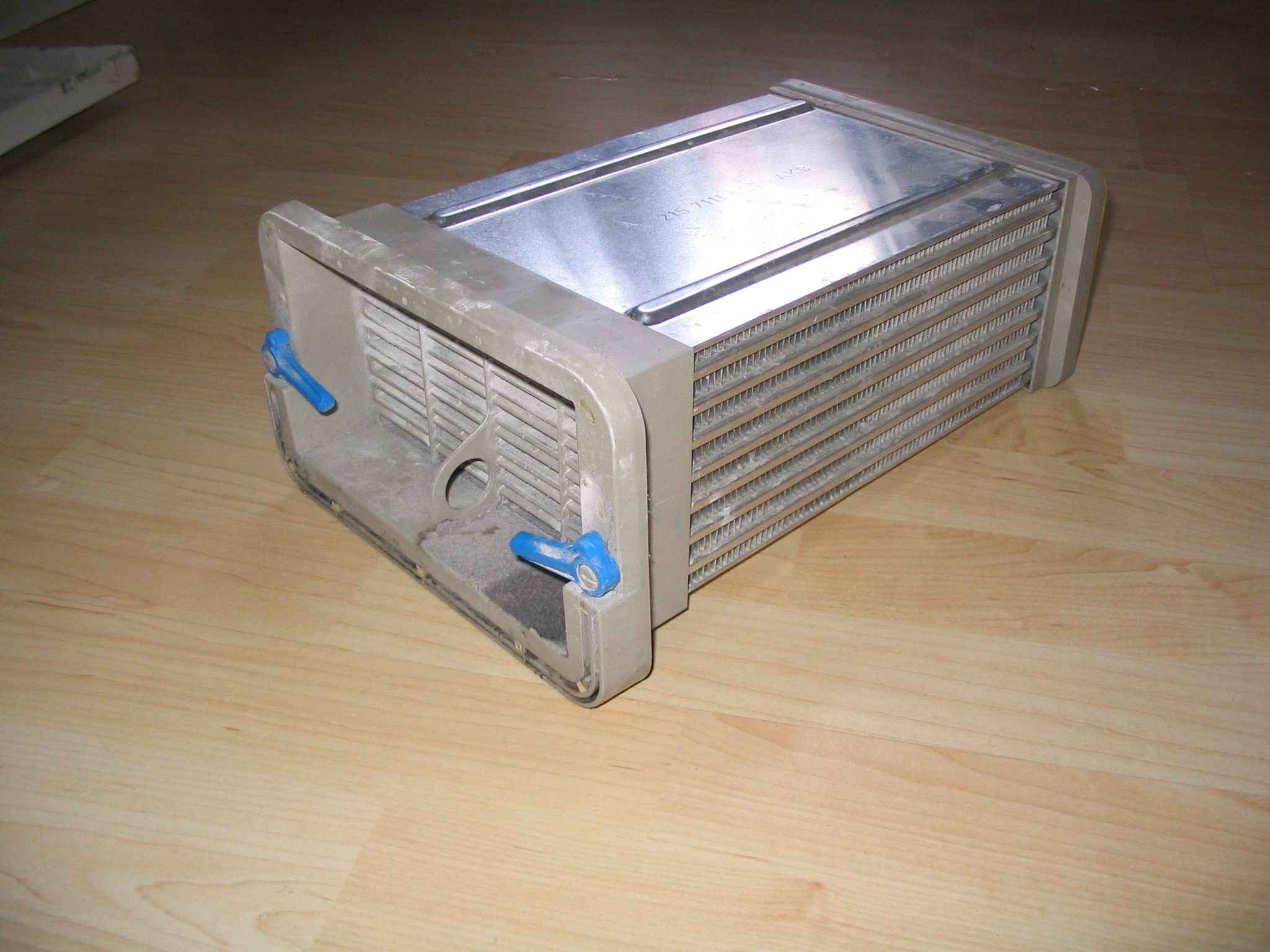 Kondensator eines Umluft-Wäschetrockners